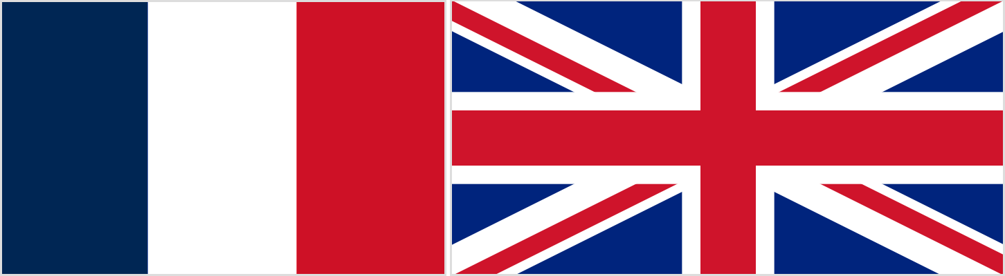 Le bandiere della Francia e del Regno Unito